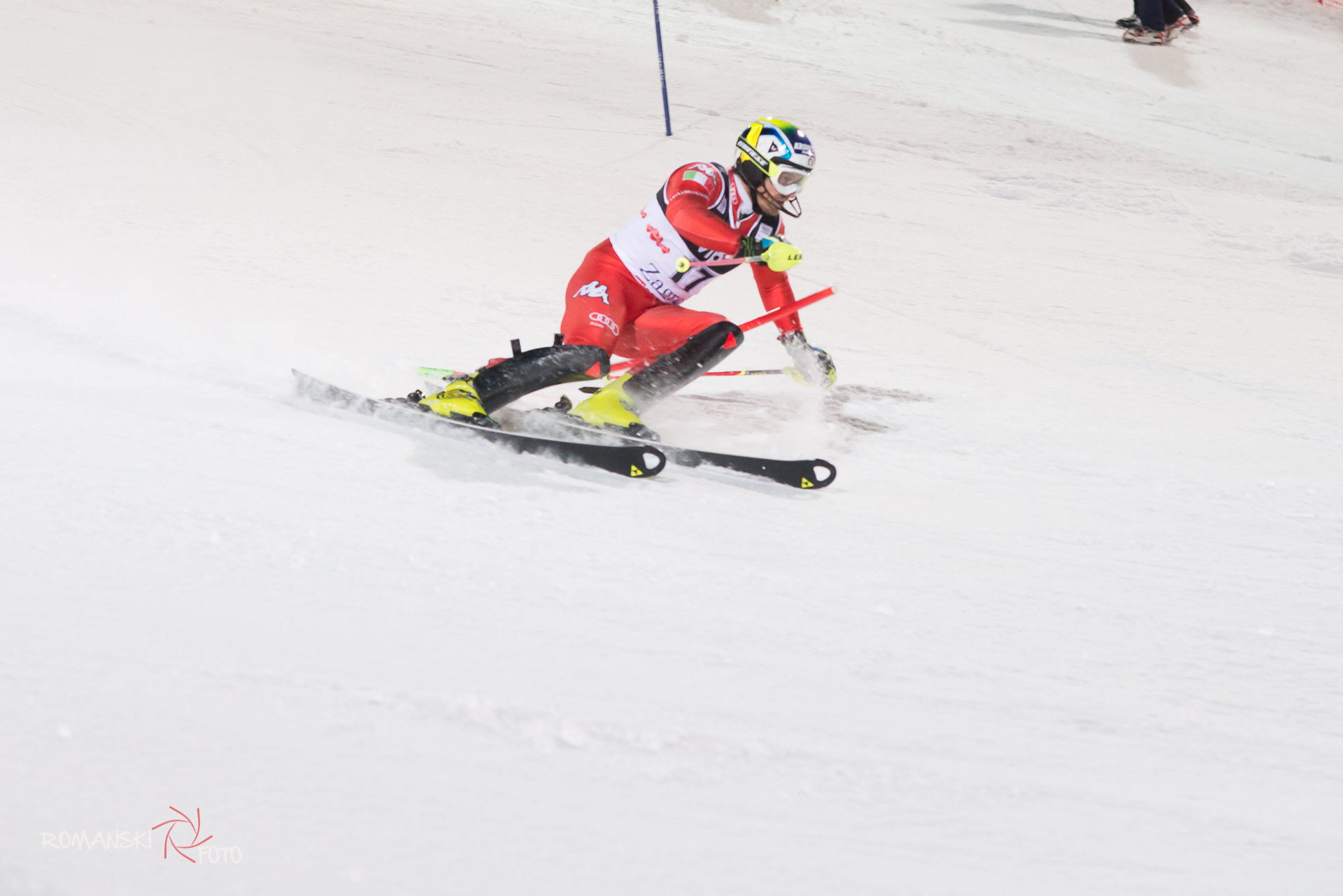 MOELGG Manfred